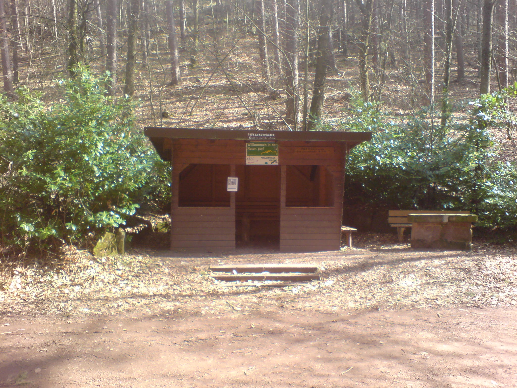 Die Schutzhütte des Pwv Gossersweler Stein.